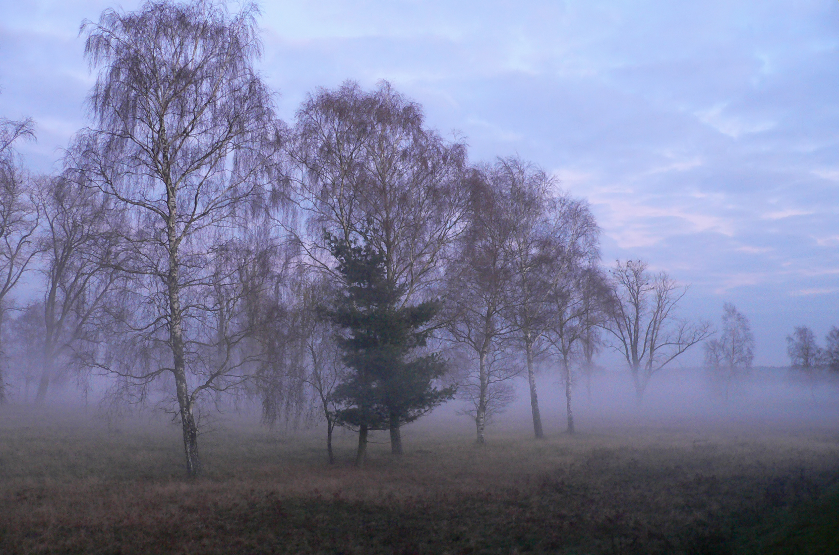 Camp Reinsehlen